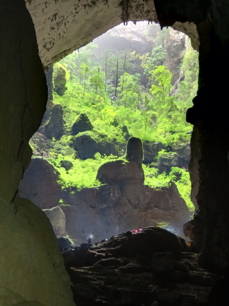 Son Doong-72